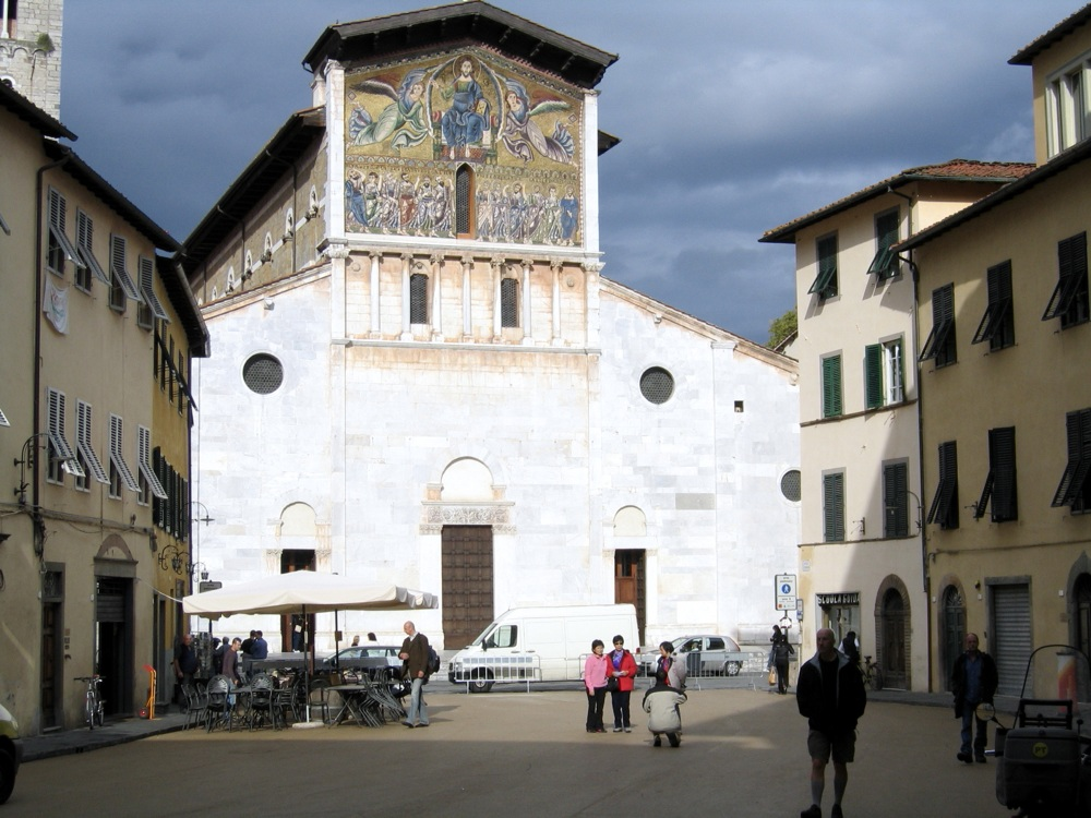 Chiesa San Frediano, Lucca, Toscana, ItalyIMG_3718.JPG